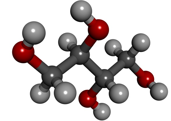 Az eritritol térbeli szerkezete